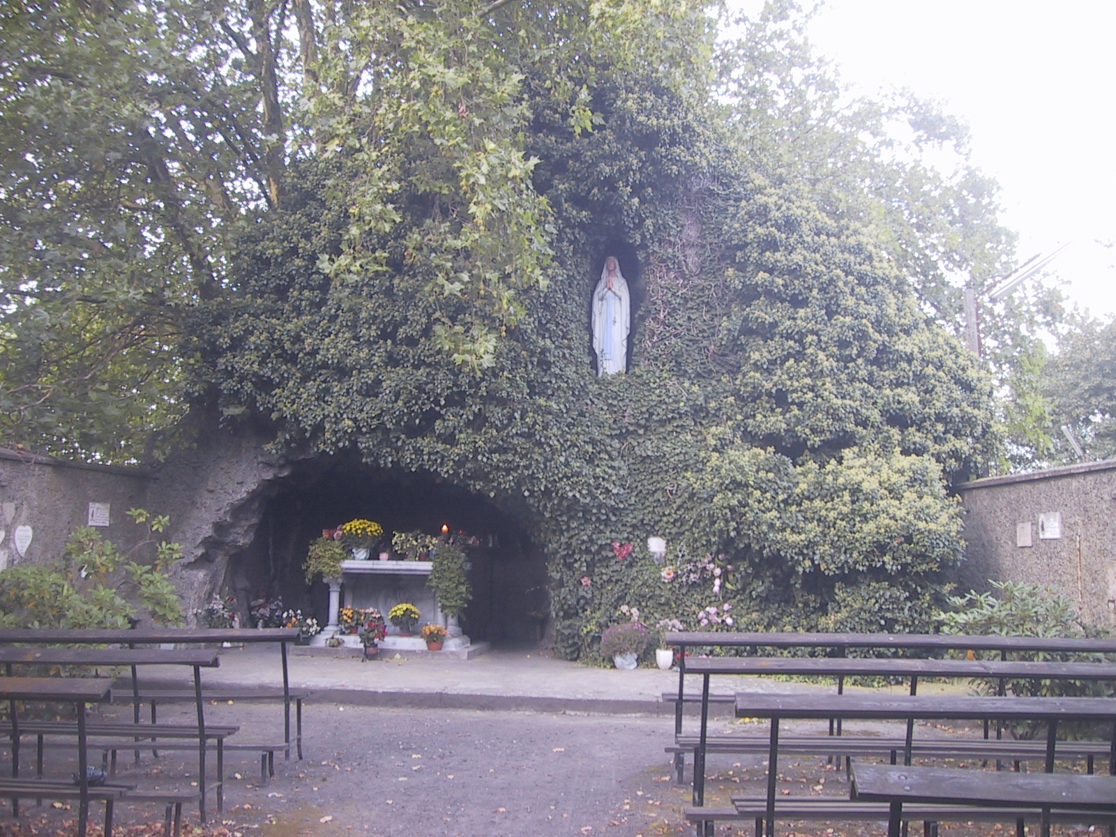 Grotte Notre-Dame de Lourdes à Alleur, Belgique